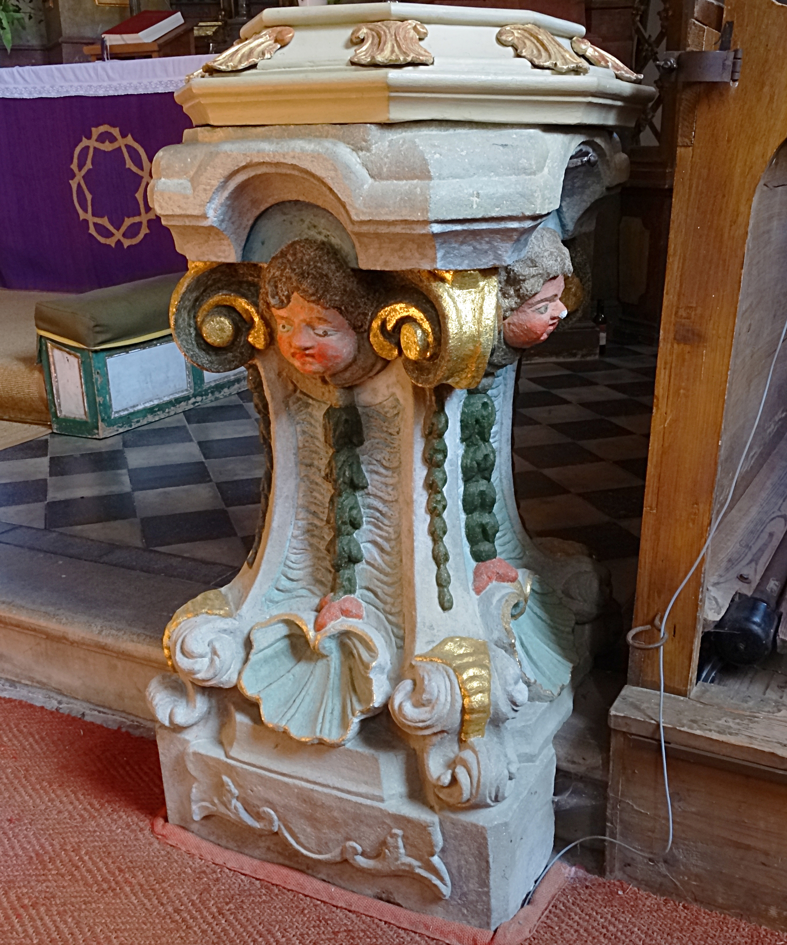 der alte Taufstein in der Oberseifersdorfer Kirche